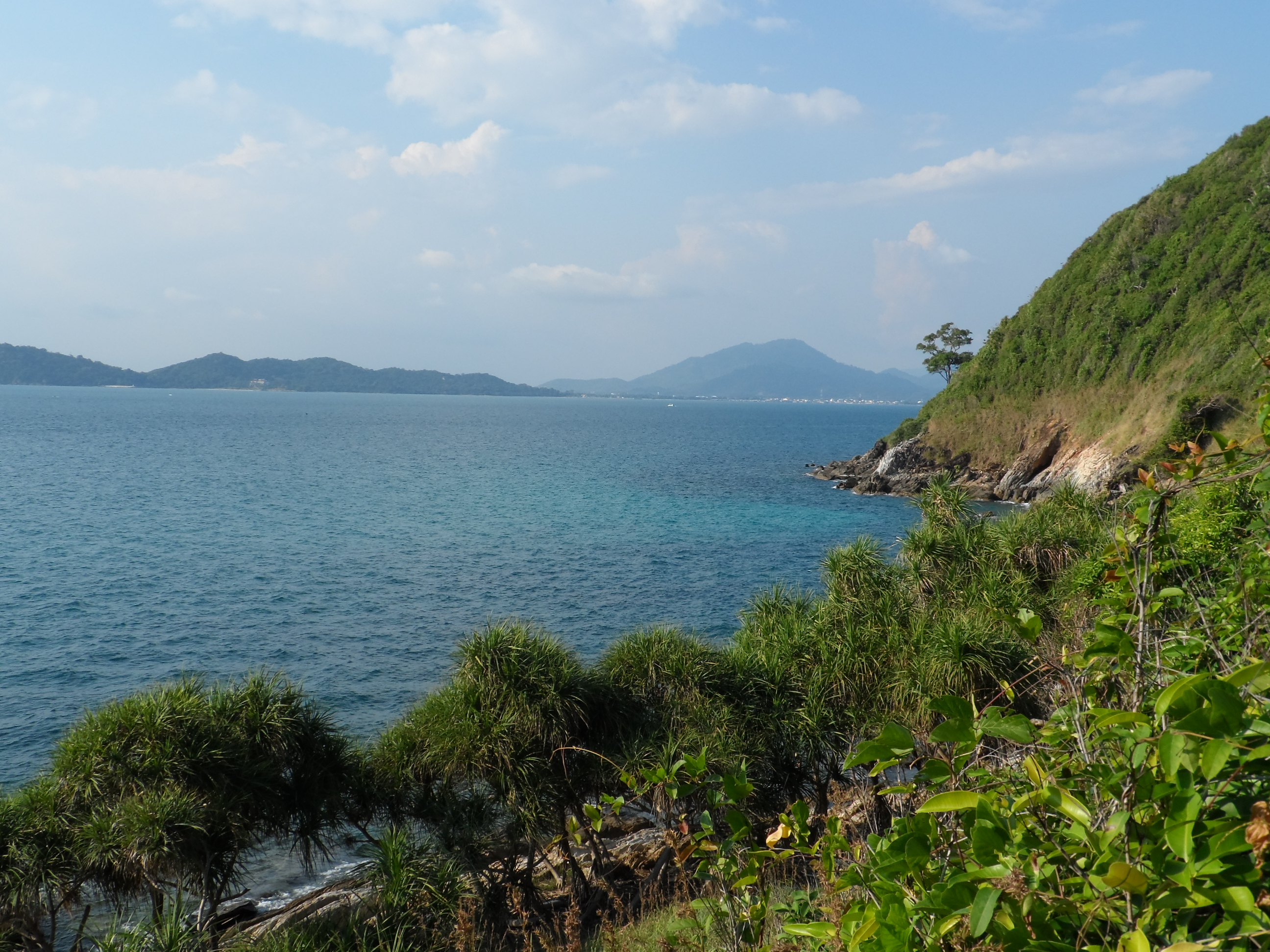 ชายฝั่งทางด้านตะวันตกของเกาะเสม็ด